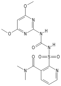 nicosulfuron herbicide